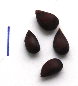 Samen des Apfels "Roter Pariner"